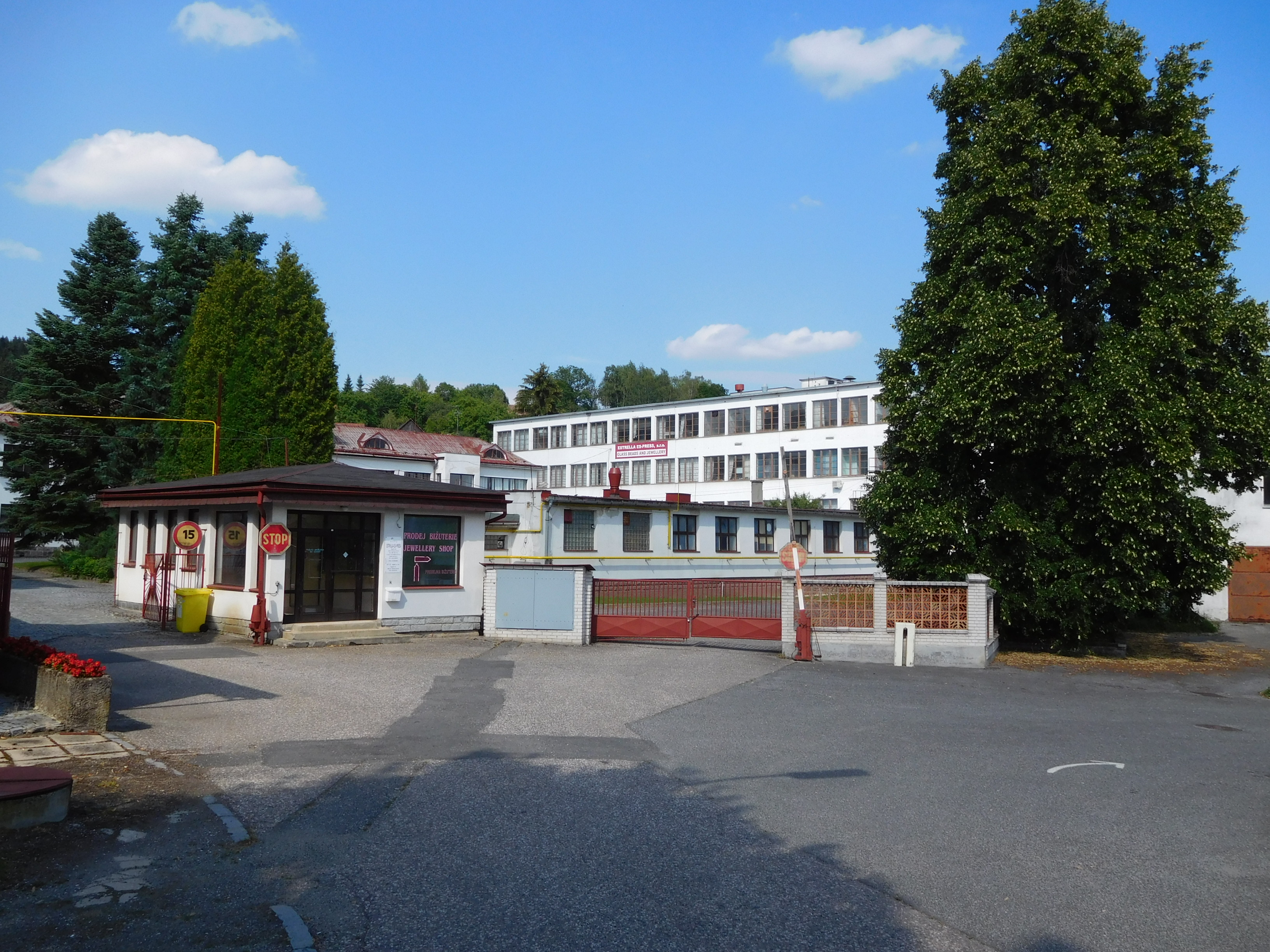 Těpeře - továrna na bižuterii Estrela